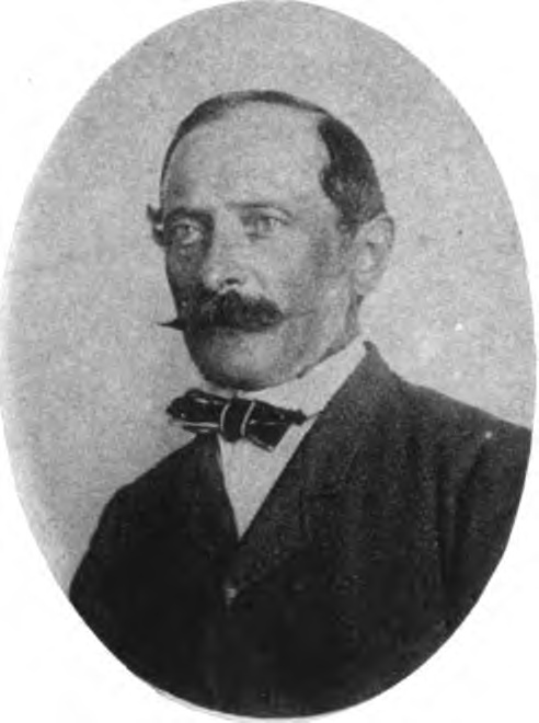 Filippo De Filippi